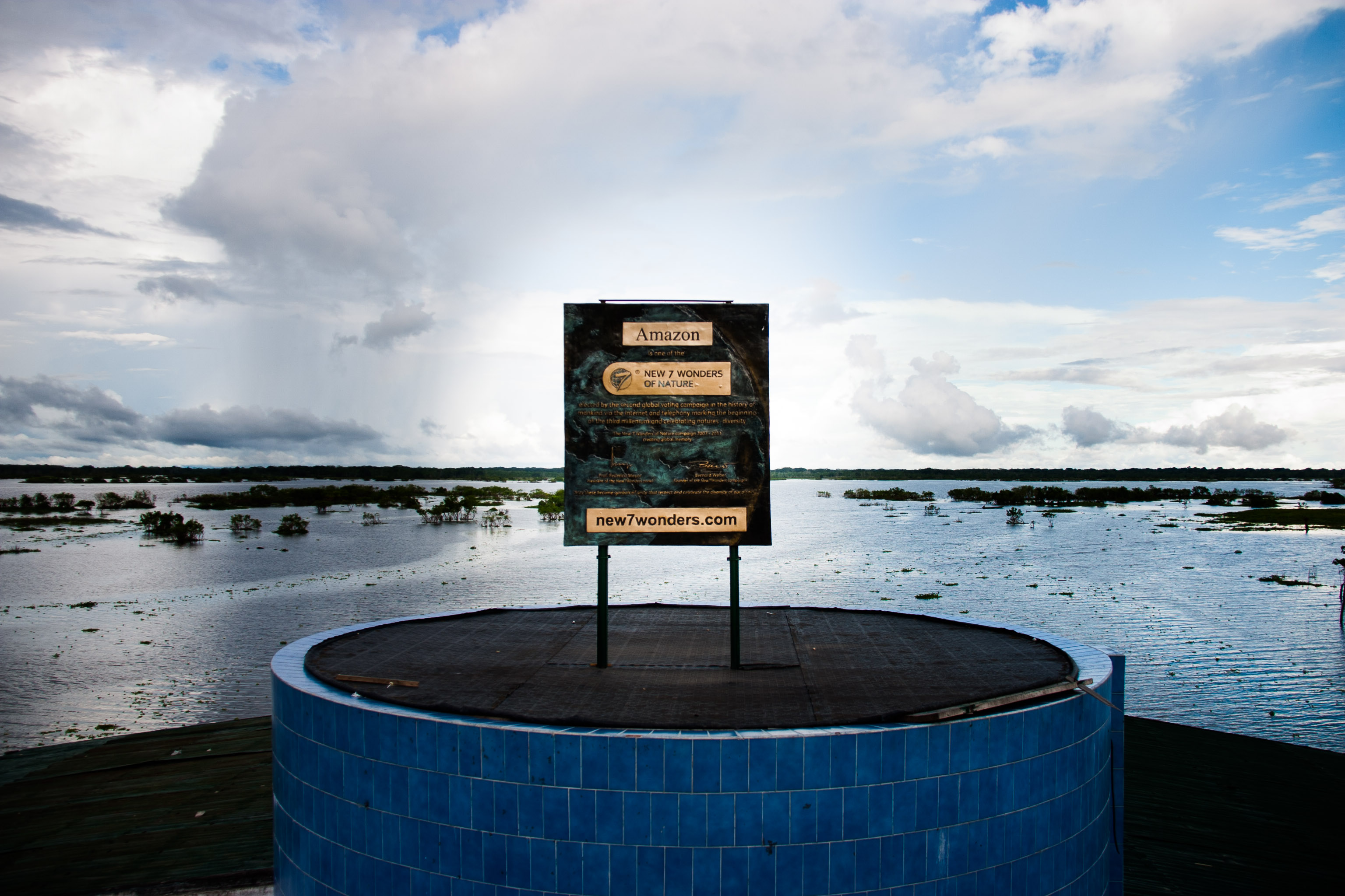 Placa oficial de la Amazonia como una de las maravillas naturales del mundo.